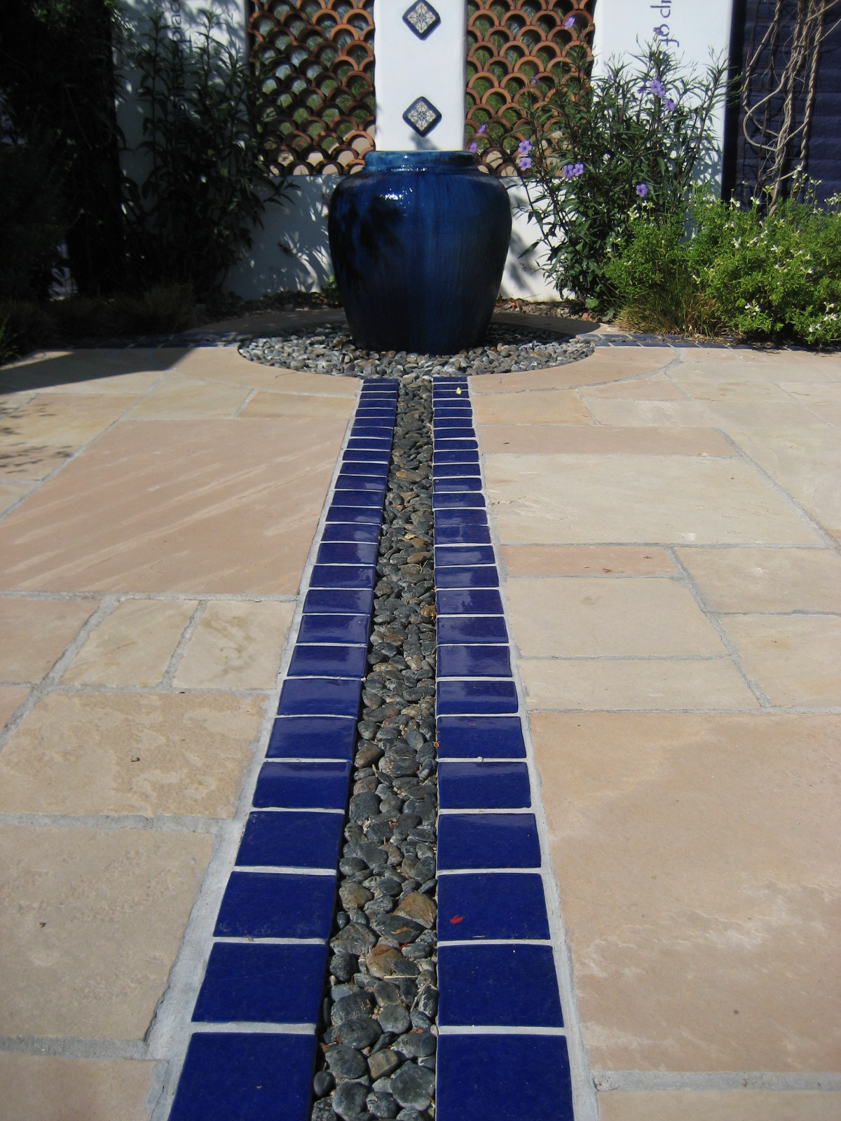 Moorish garden detail